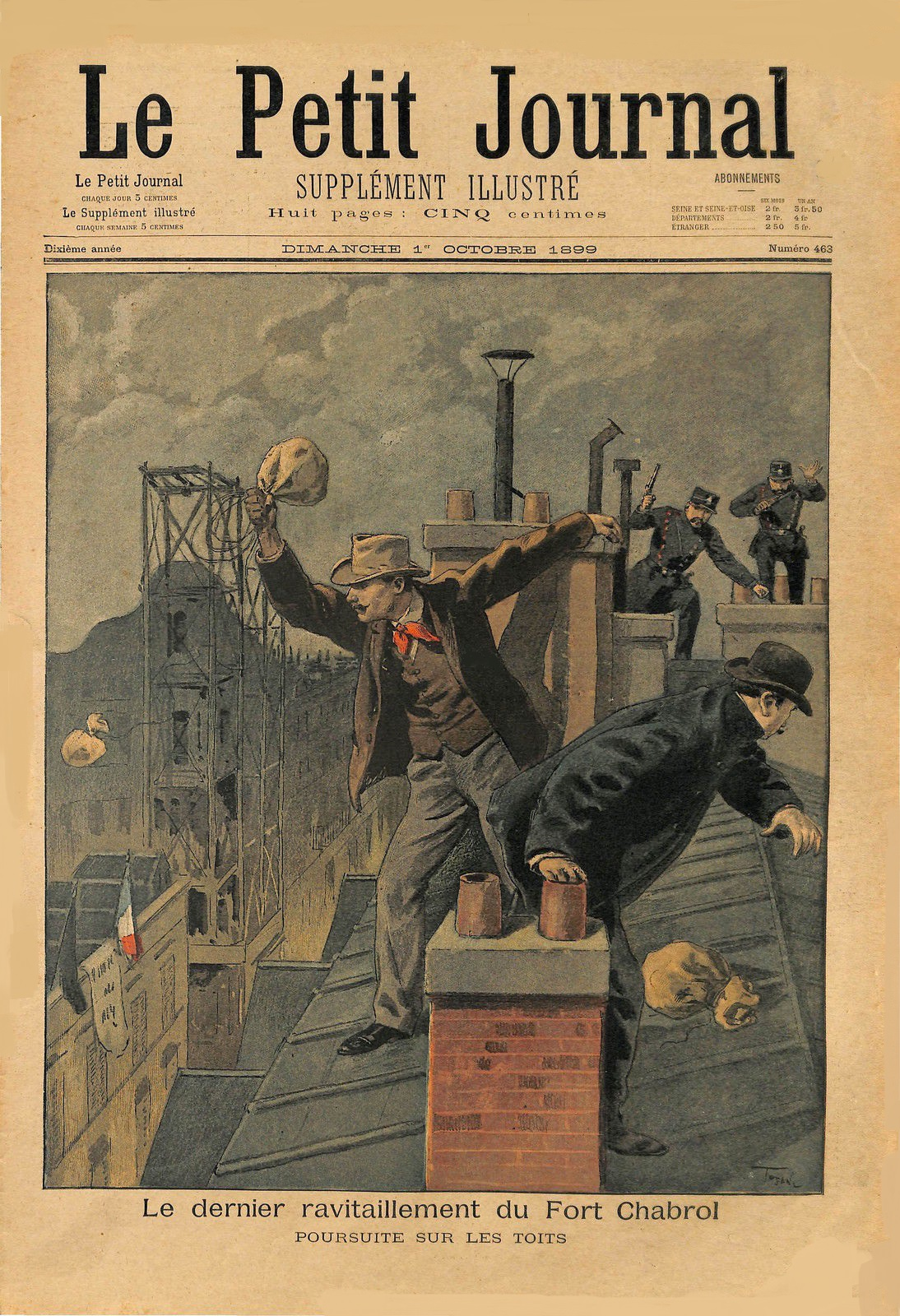 Une du Petit Journal Illustré, 01/10/1899